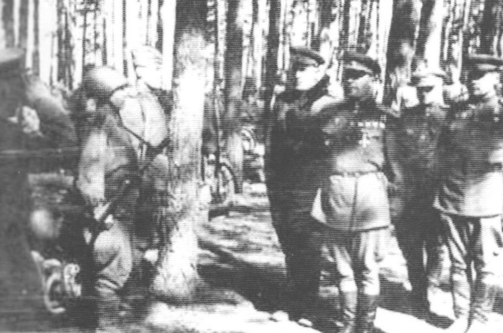 Il generale Radzevskij, comandante della Secona Armata carri sovietica durante l'offensiva Lublino-Brest dell'estate 1944